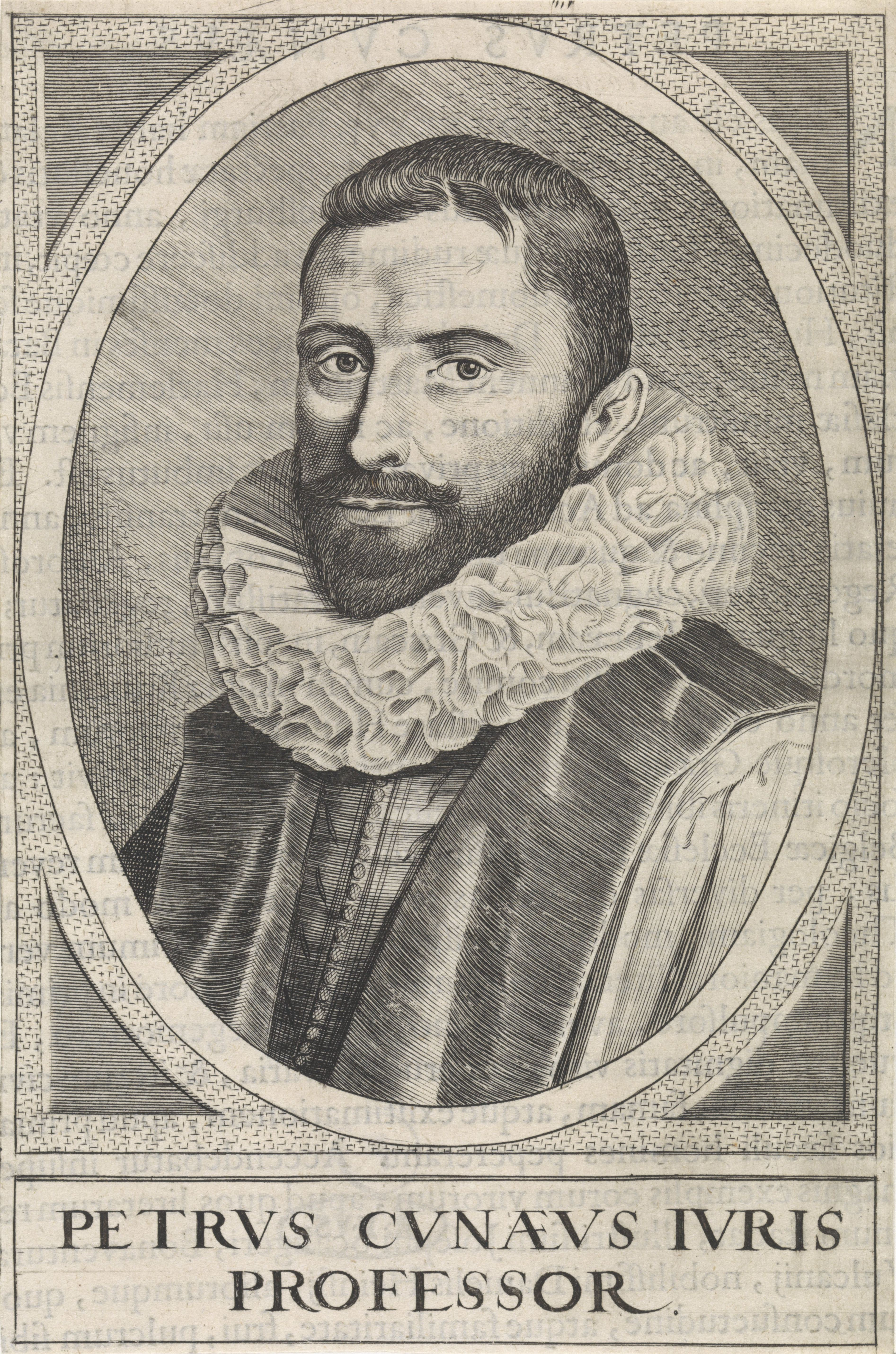 IdentificatieTitel(s): Portret van Petrus CunaeusObjecttype: prent boekillustratie Objectnummer: RP-P-1898-A-20206Catalogusreferentie: Franken&van der Kellen 15Franken&van der Kellen 456-465Opschriften / Merken: verzamelaarsmerk, verso, gestempeld: Lugt 964Omschrijving: Portret van Portret van Petrus Cunaeus, professor en rechtsgeleerde te Leiden.VervaardigingVervaardiger: prentmaker: de Passe (atelier van)prentmaker: Jan van de Velde (II) (verworpen toeschrijving)uitgever: Abraham Elzevier (I)uitgever: Bonaventura Elzevieruitgever: Andries ClouckPlaats vervaardiging: LeidenDatering: 1625Fysieke kenmerken: gravure, boekdruk versoMateriaal: papier Techniek: graveren (drukprocedé) / boekdrukAfmetingen: blad: h 150 mm × b 99 mmToelichtingBoekillustratie in: Meursius, Joannes. Athenæ Batavæ. Sive, De vrbe Leidensi, & academiâ, virisque claris. Leiden: Andries Clouck, Bonaventura en Abraham Elzevier, 1625. Abusievelijk tweemaal gecatalogiseerd bij Franken & Van der Kellen.OnderwerpWie: Petrus CunaeusVerwerving en rechtenCredit line: Legaat van de heer D. Franken, Le VésinetVerwerving: legaat 1898Copyright: Publiek domein